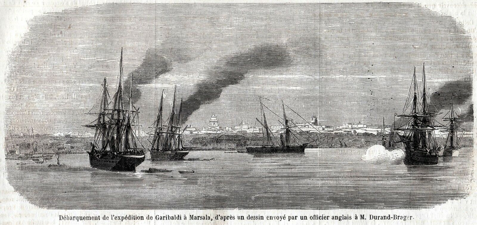 11 maggio 1860. Sbarco dei Mille a Marsala. Dal disegno di un ufficiale di marina preso da bordo di una nave inglese.